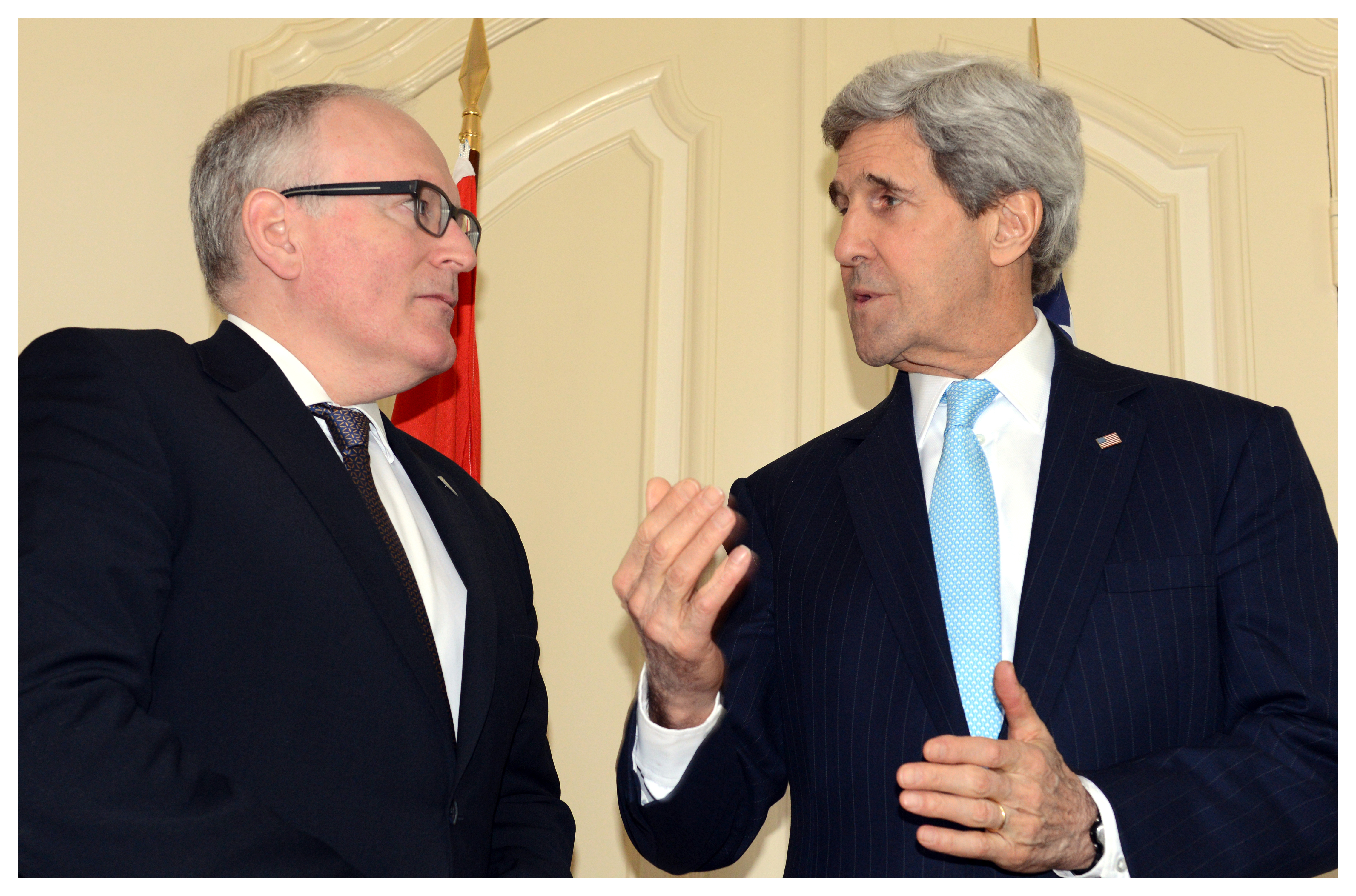 Foto: BZ/Aad Meijer